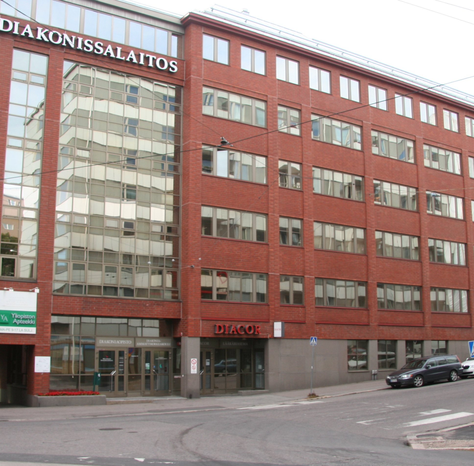 Diacor Alppikadulla, Helsinki